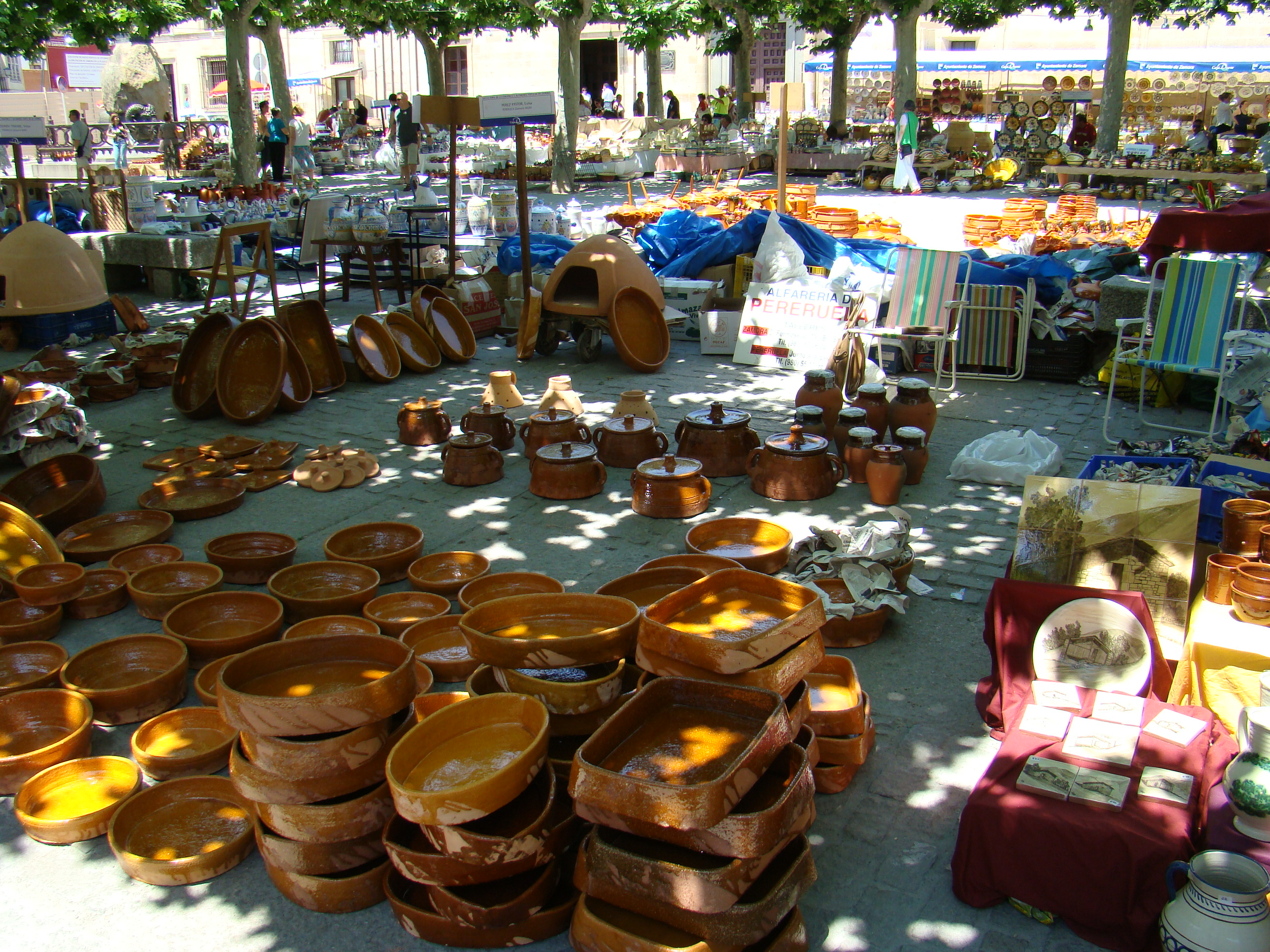 Feria de la Cerámica en la plaza de Viriato de Zamora (España). Año 2008. Barros de Pereruela.